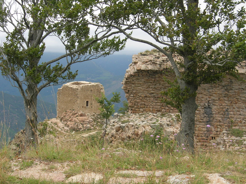 Castell de Cabrenç